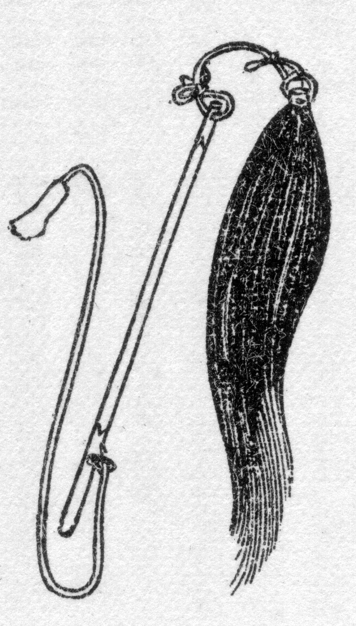 采配(Saihai)